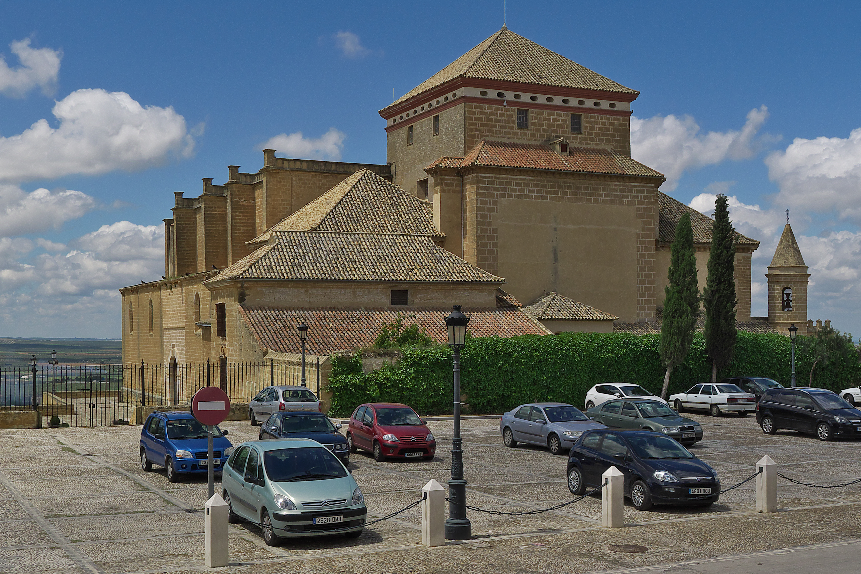 Exterior de la colegiata. Se destaca la sobriedad de sus formas. Paulo III (1534-1549) concedió al Cabildo de la Colegiata, un Abad, con mitra y báculo, y título de Canciller de la Universidad de Osuna. Un Chantre, Maestrescuela, Arcediano y un Tesorero. Diez canónigos e igual número de Racioneros, y otros clérigos y acólitos.